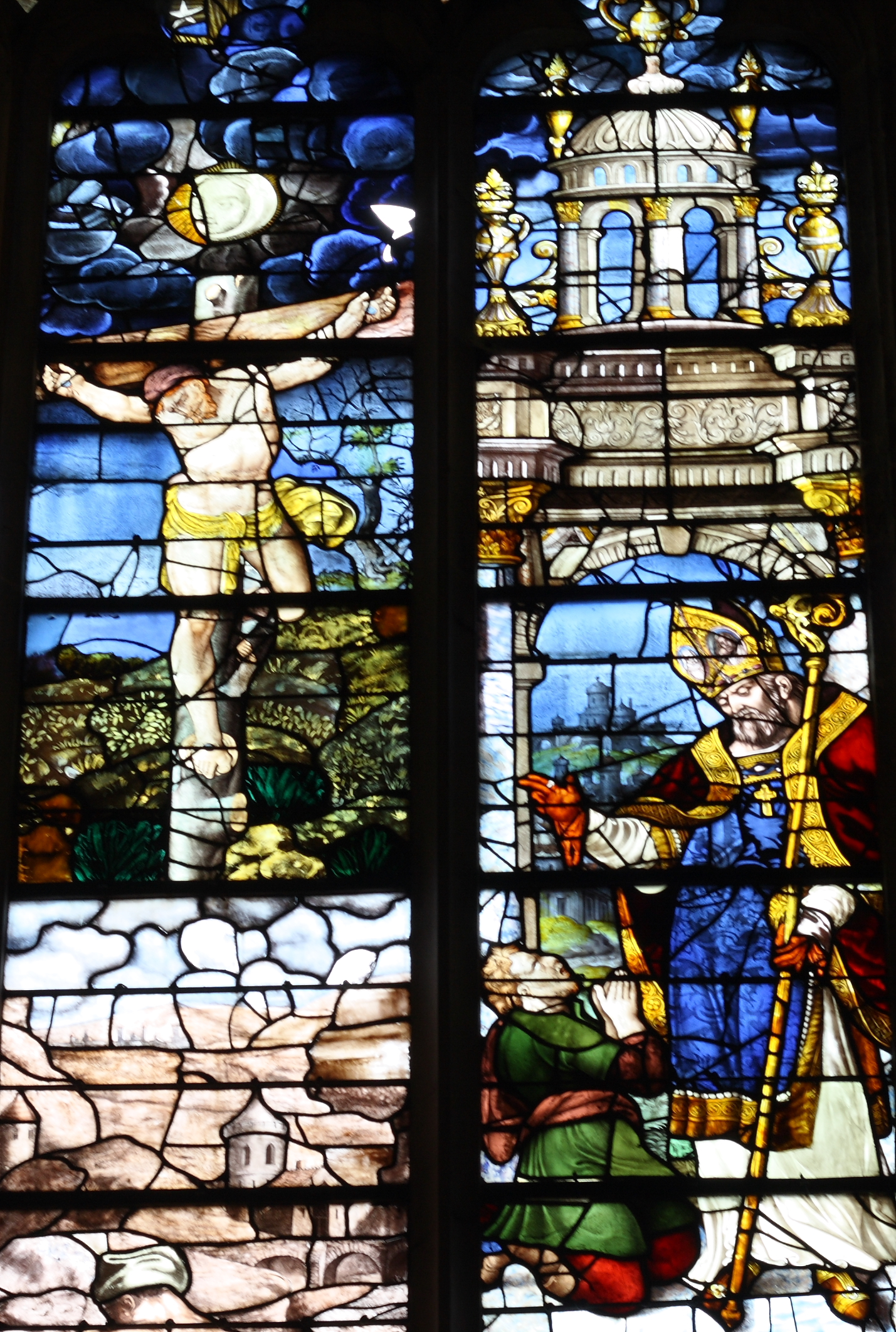 Bleiglasfenster (Ausschnitt) in der katholischen Kirche Saint-Basile in Étampes, Darstellung: Kreuzigung und rechts der hl. Basilius